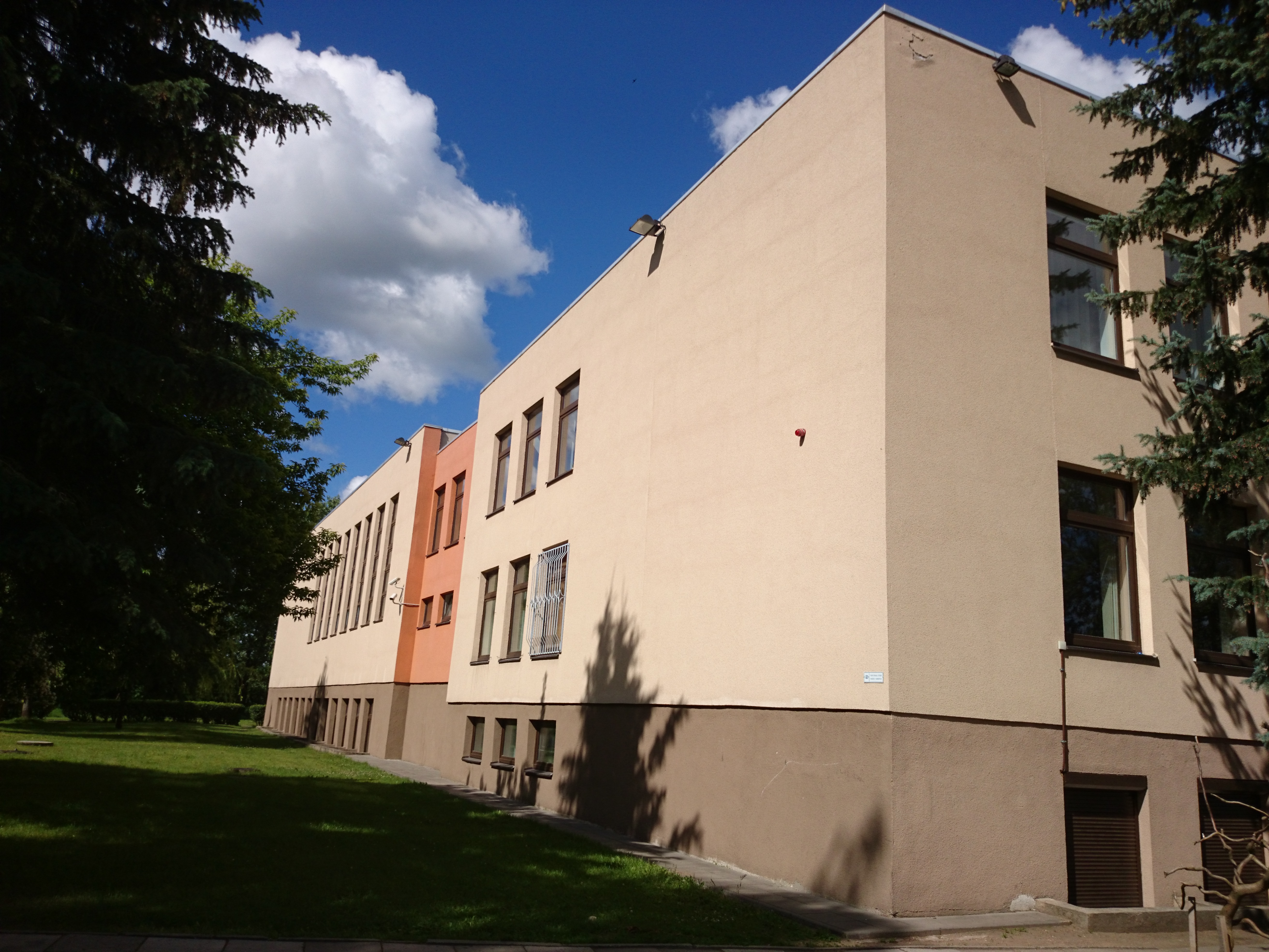 Lietavos pagrindinė mokykla